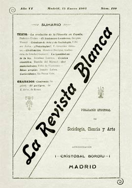 La Revista Blanca est une revue libertaire publiée à Madrid de 1898 à 1905 et à Barcelone du 1er juin 1923 au 15 août 1936. - Couverture du numéro 110 du 15 janvier 1903.